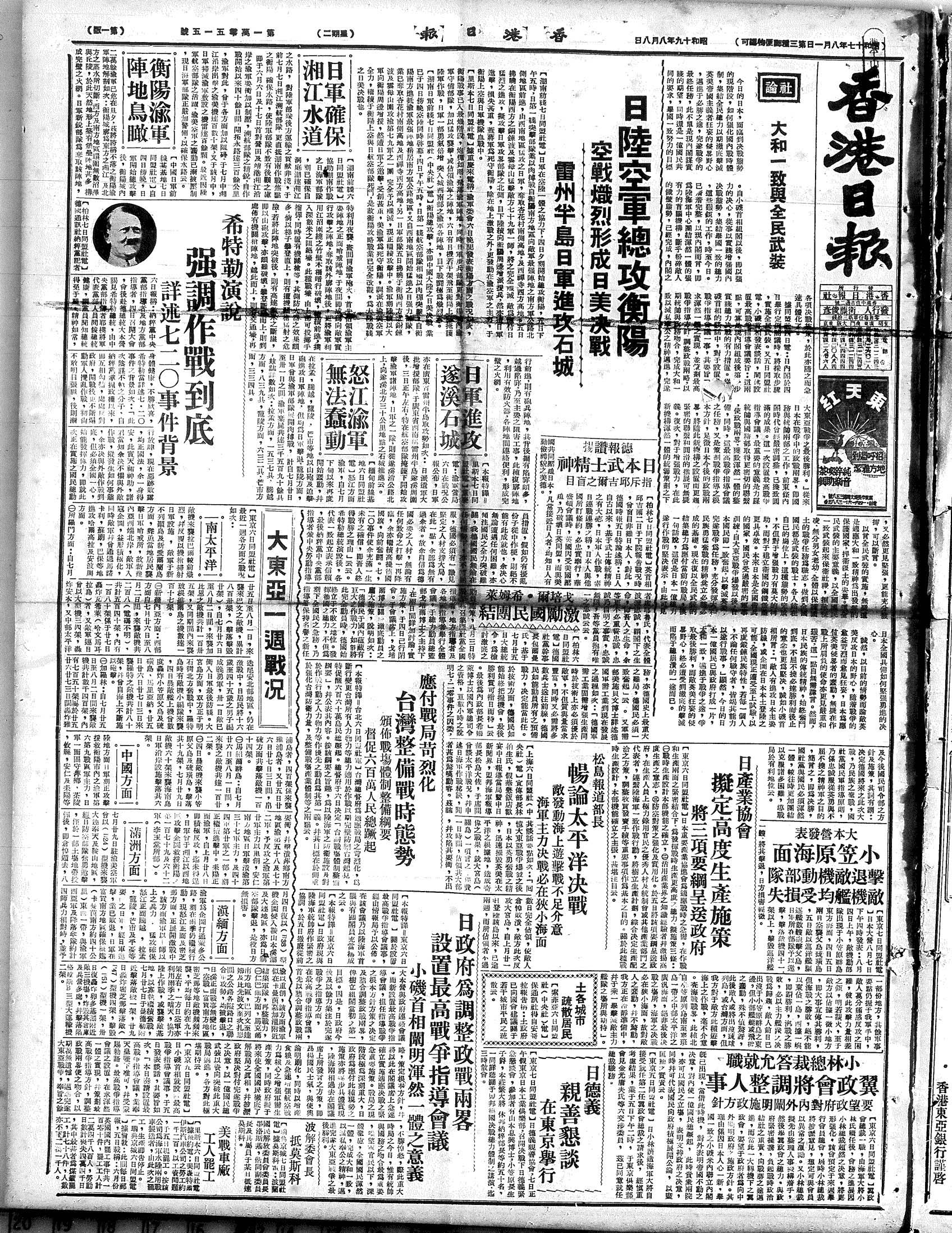 中文（香港）: 《香港日報》中文版1944年8月8日第一版。該報社已結束逾50年，因此沒有版權問題。